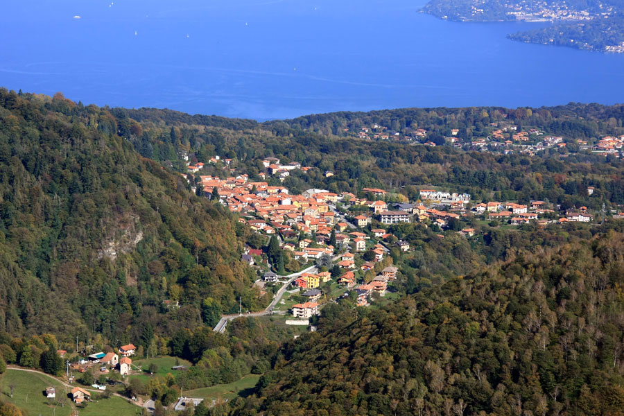 Panorama di Gignese dalla cima del Monte Falò (m 1081)